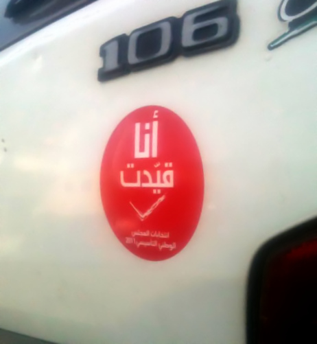 Autocollant distribué par l’Isie (Instance supérieure indépendante des élections) en Tunisie, pour inciter les électeurs à s'inscrire dans les bureaux de vote. L'autocollant comprend la mention « Je me suis inscrit » (Ena Kayadit)